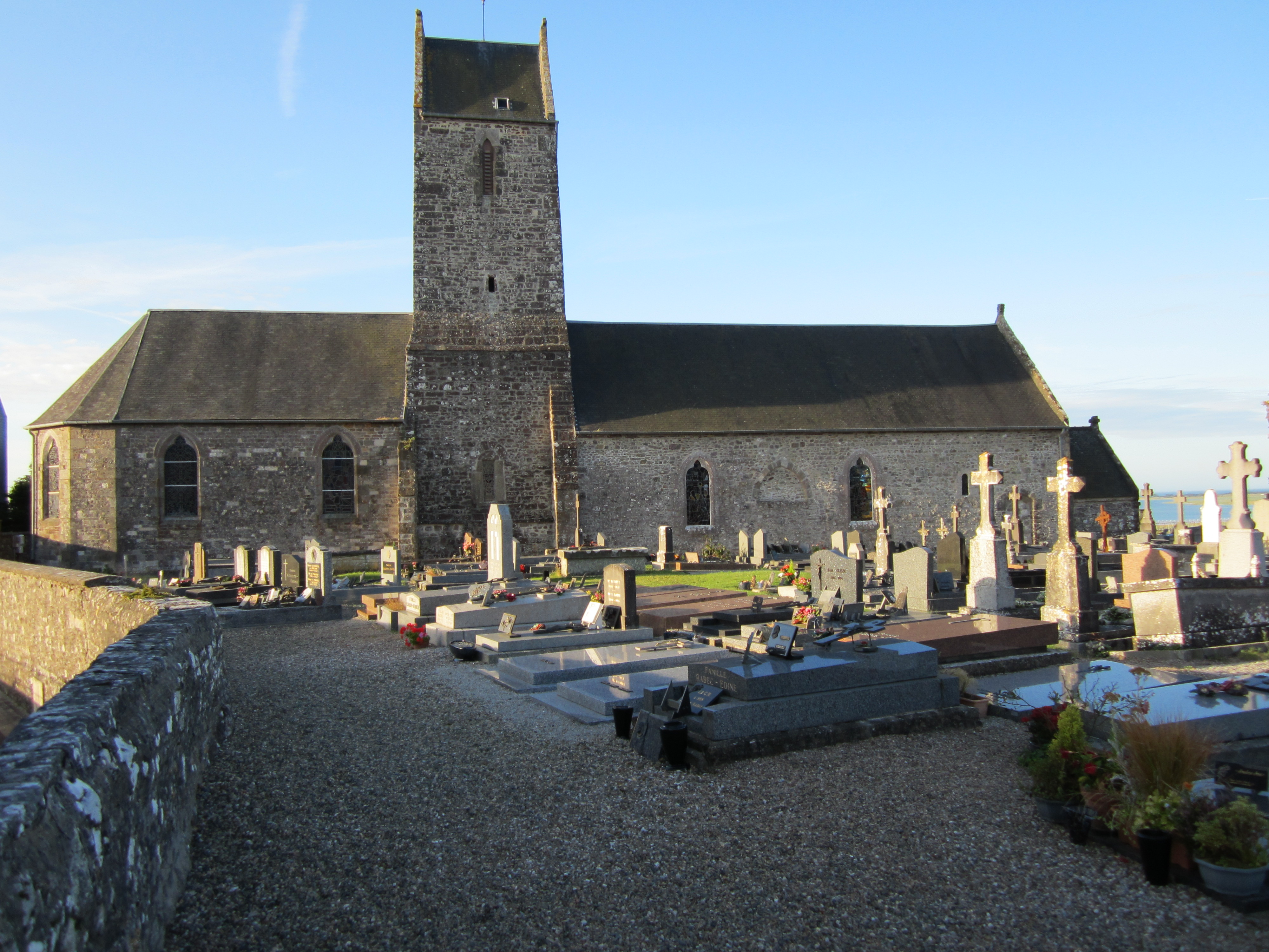 église Notre-Dame de Tourville-sur-Sienne